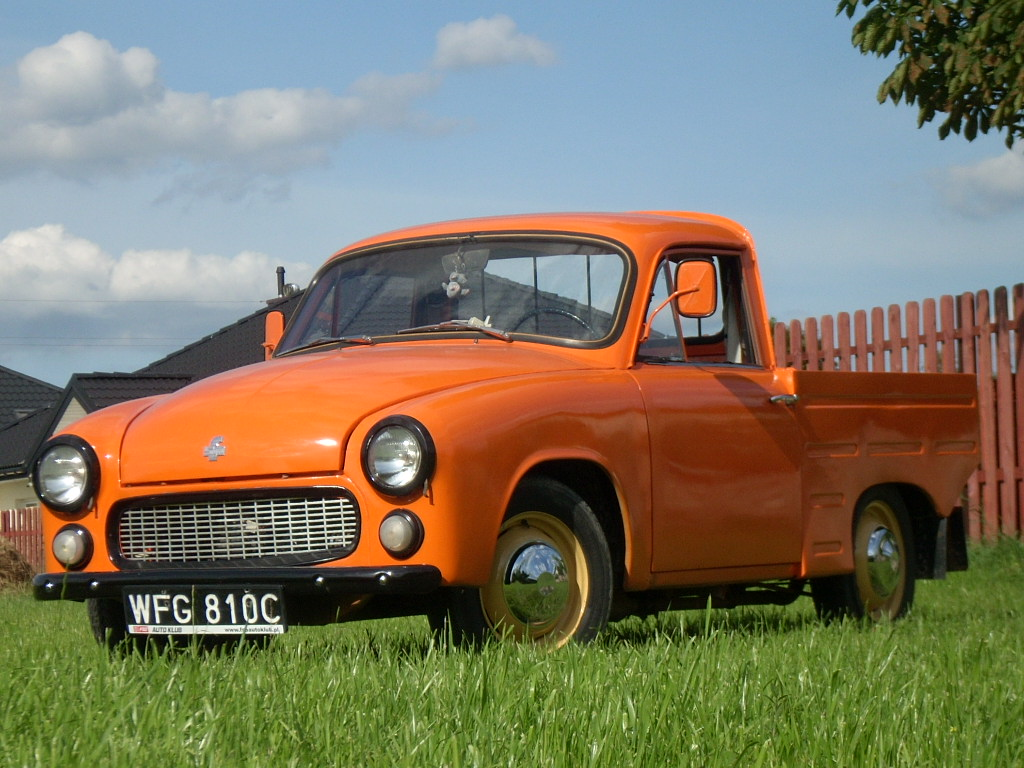 Syrena R-20 z 1981 roku